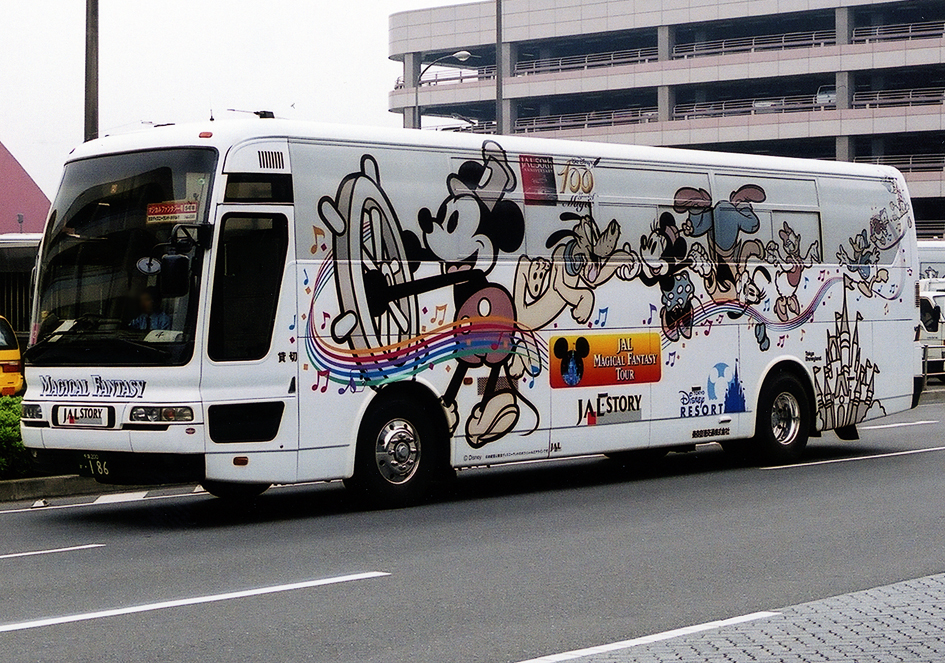 東京空港交通 三菱ふそう・エアロクィーンI U-MS821P マジカルファンタジー